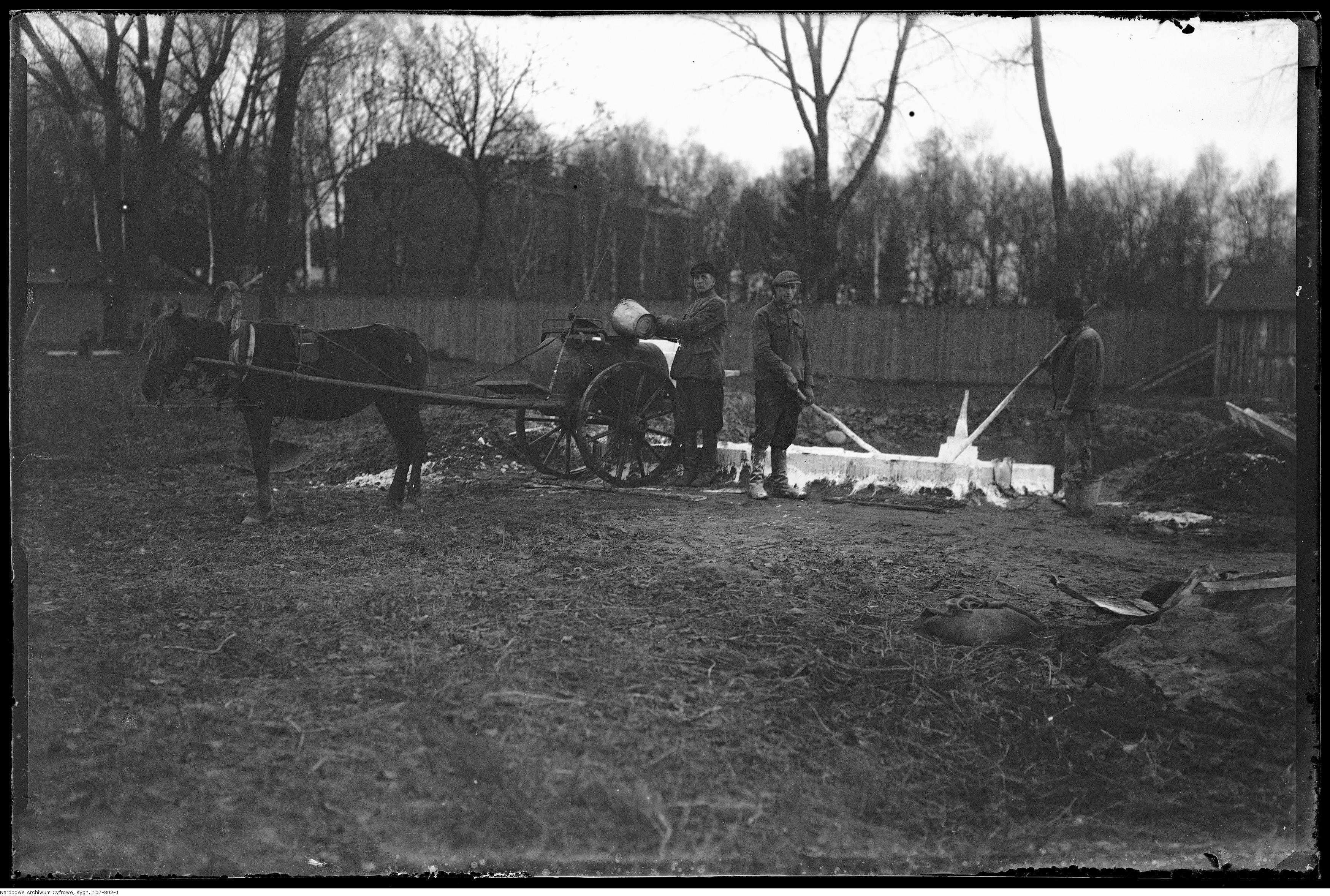 Gaszenie wapna.